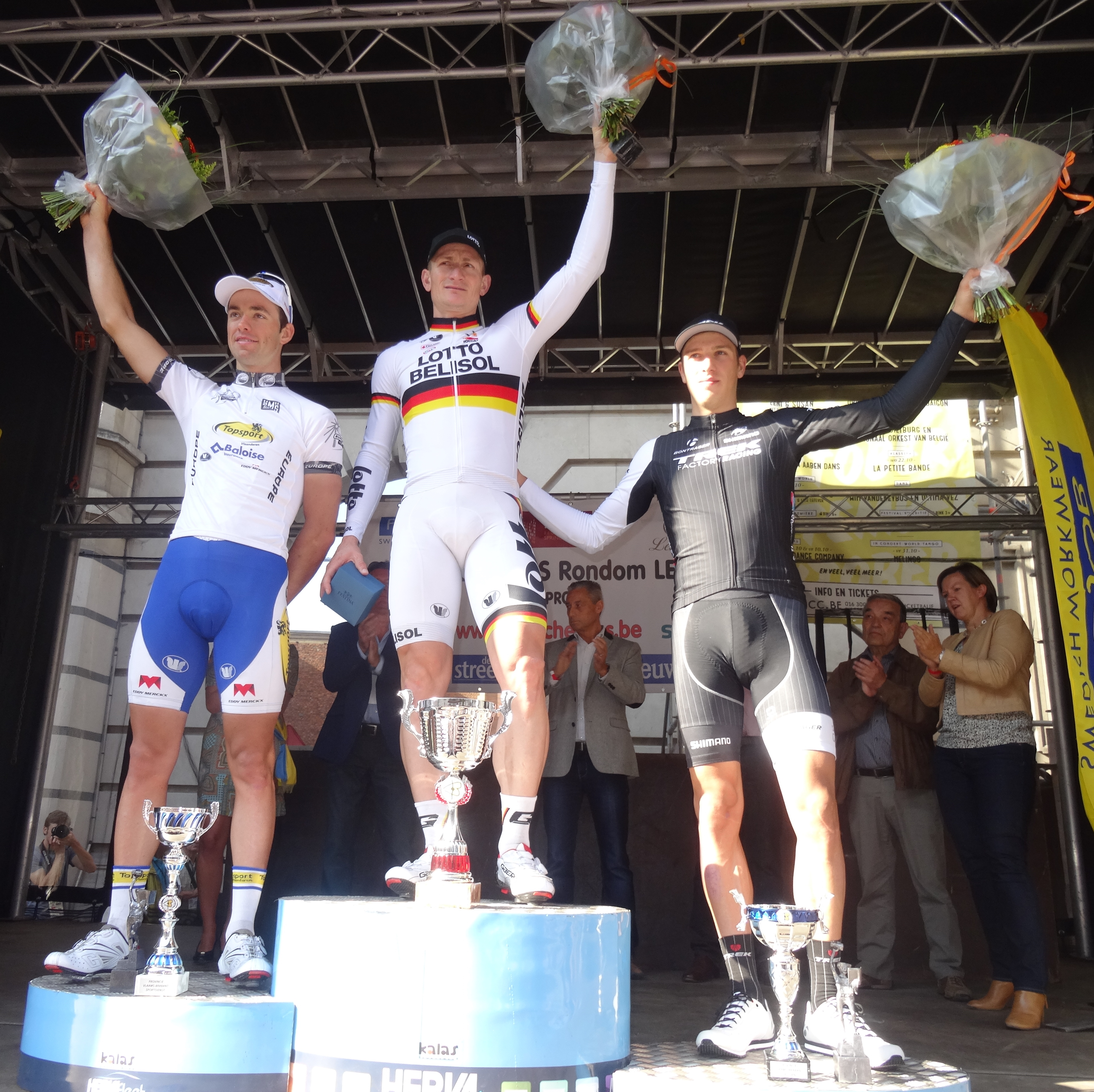 Reportage photographique réalisé le dimanche 14 septembre à l'occasion du départ et de l'arrivée du Grand Prix Jef Scherens 2014 à Louvain, Belgique.